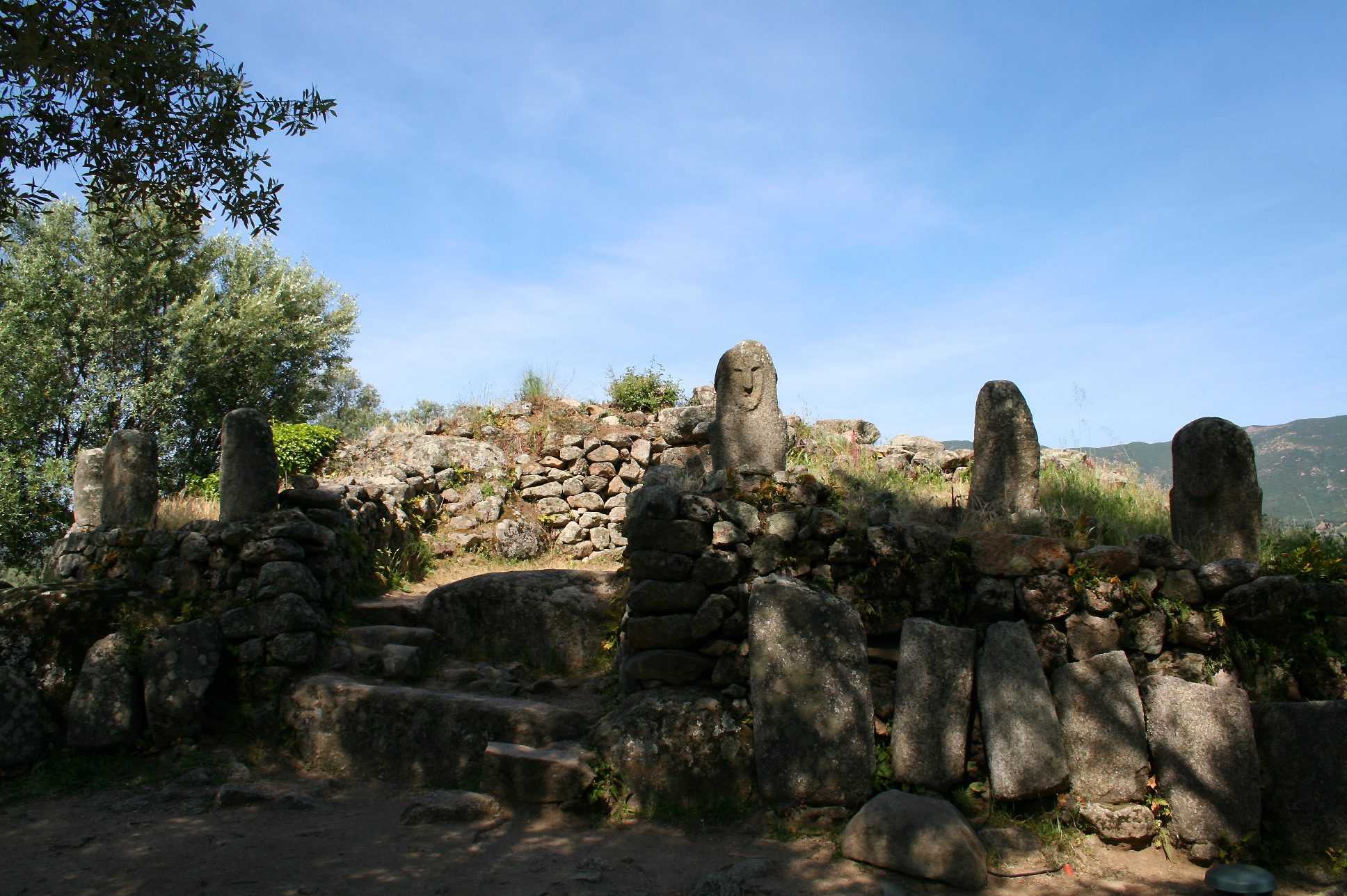 Filitosa France (Corse-du-Sud), le monument central (oppidum) et les statues-menhirs Filitosa VIII, XI, VII, IX, X et XIII.